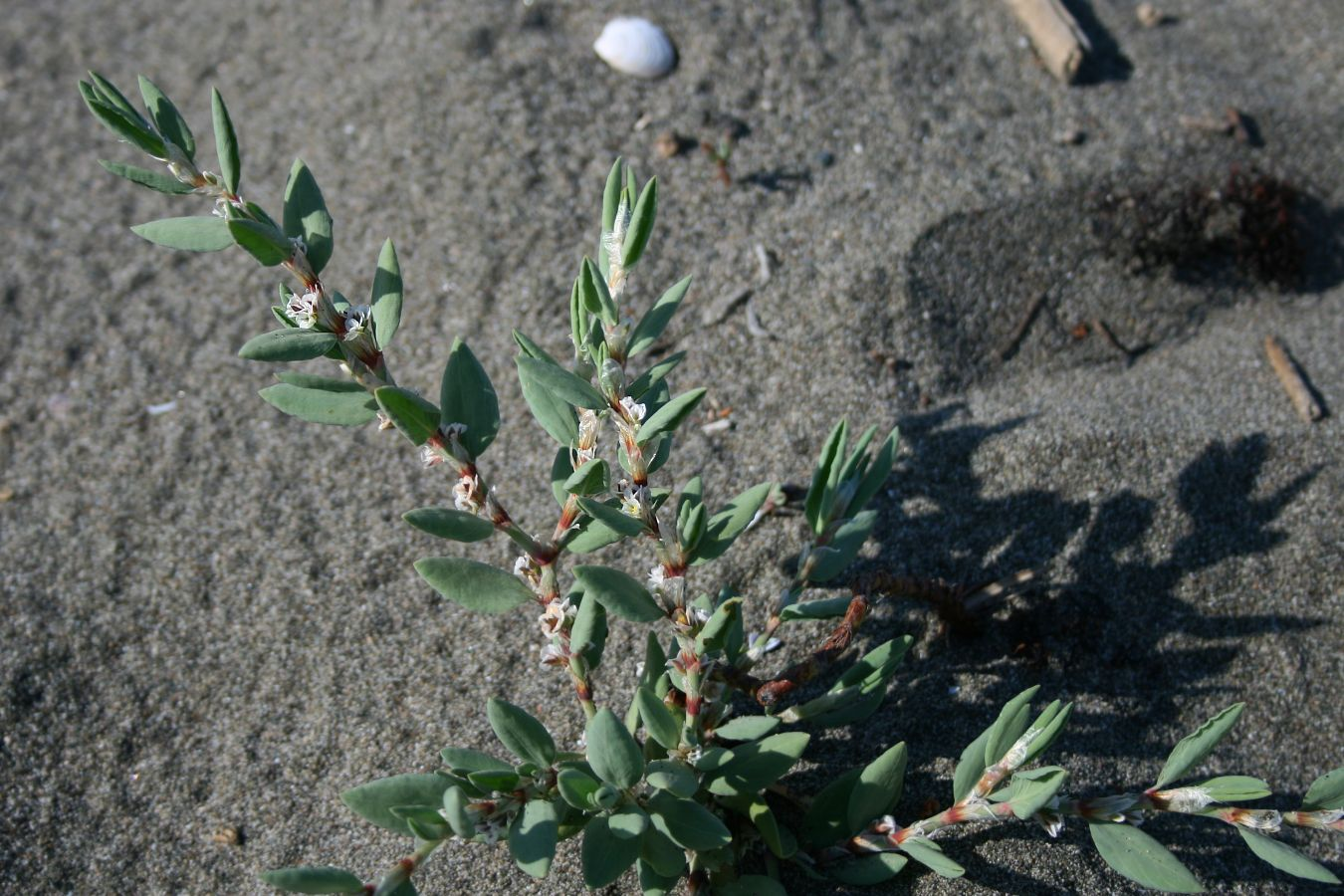 Polygonum maritimum, Knöterichgewächse (Polygonaceae) - Türkei/Türkiye/Turkey: Sakarya Prov./Sakarya ili, Sandküste des Schwarzen Meers (Karadeniz) bei Kocaali E Karasu